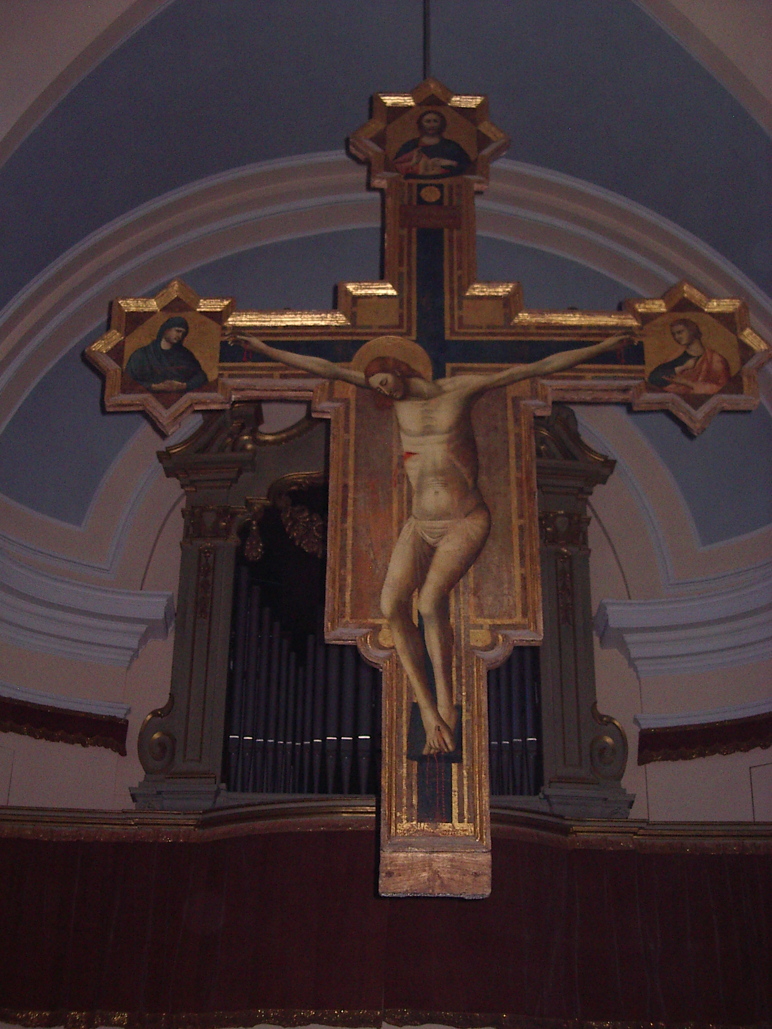 Crucifix de Urbania , peinture sur bois, XIVe siècle de Pietro da Rimini , Urbania , Cattedrale di S. Cristoforo